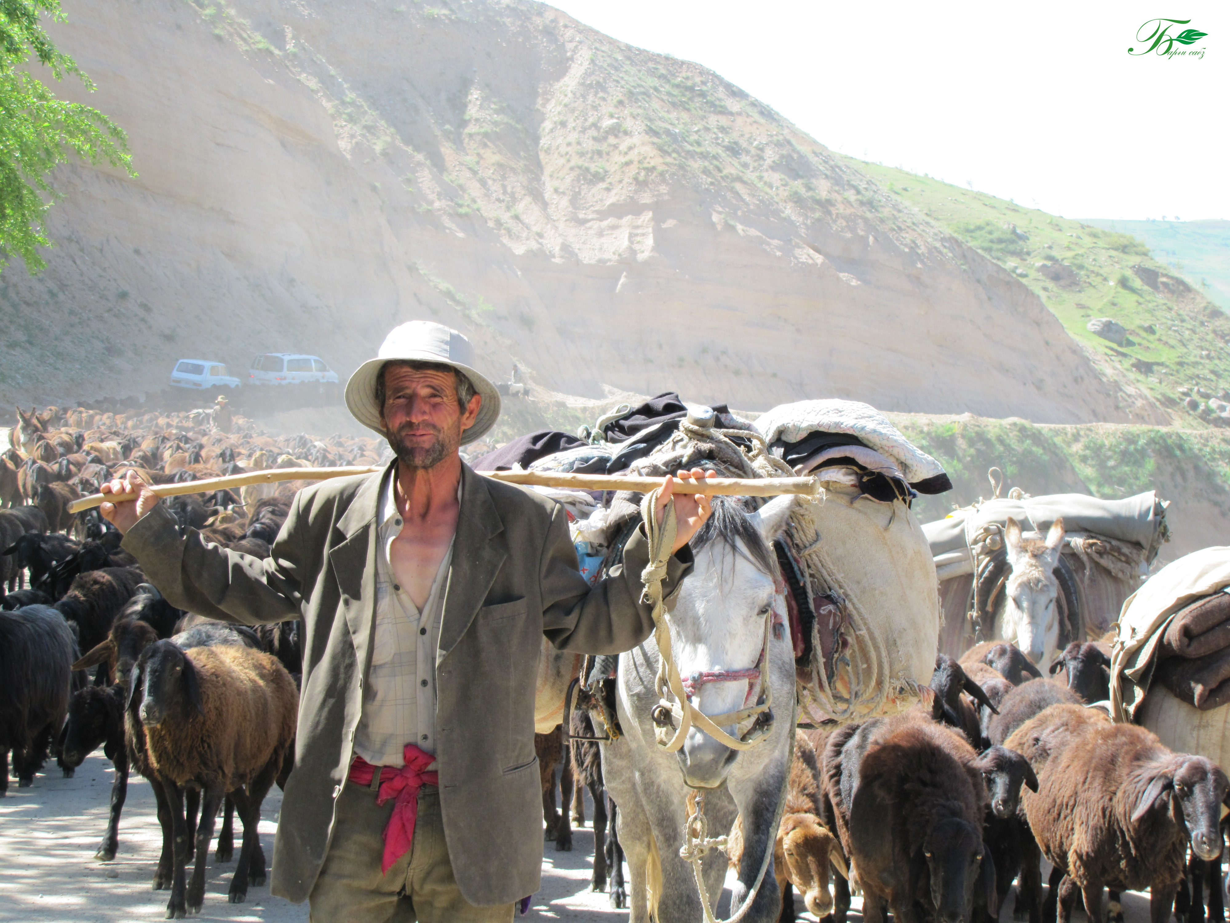 Тоҷикӣ: Чӯпоне дар куҳистони Ҳисор